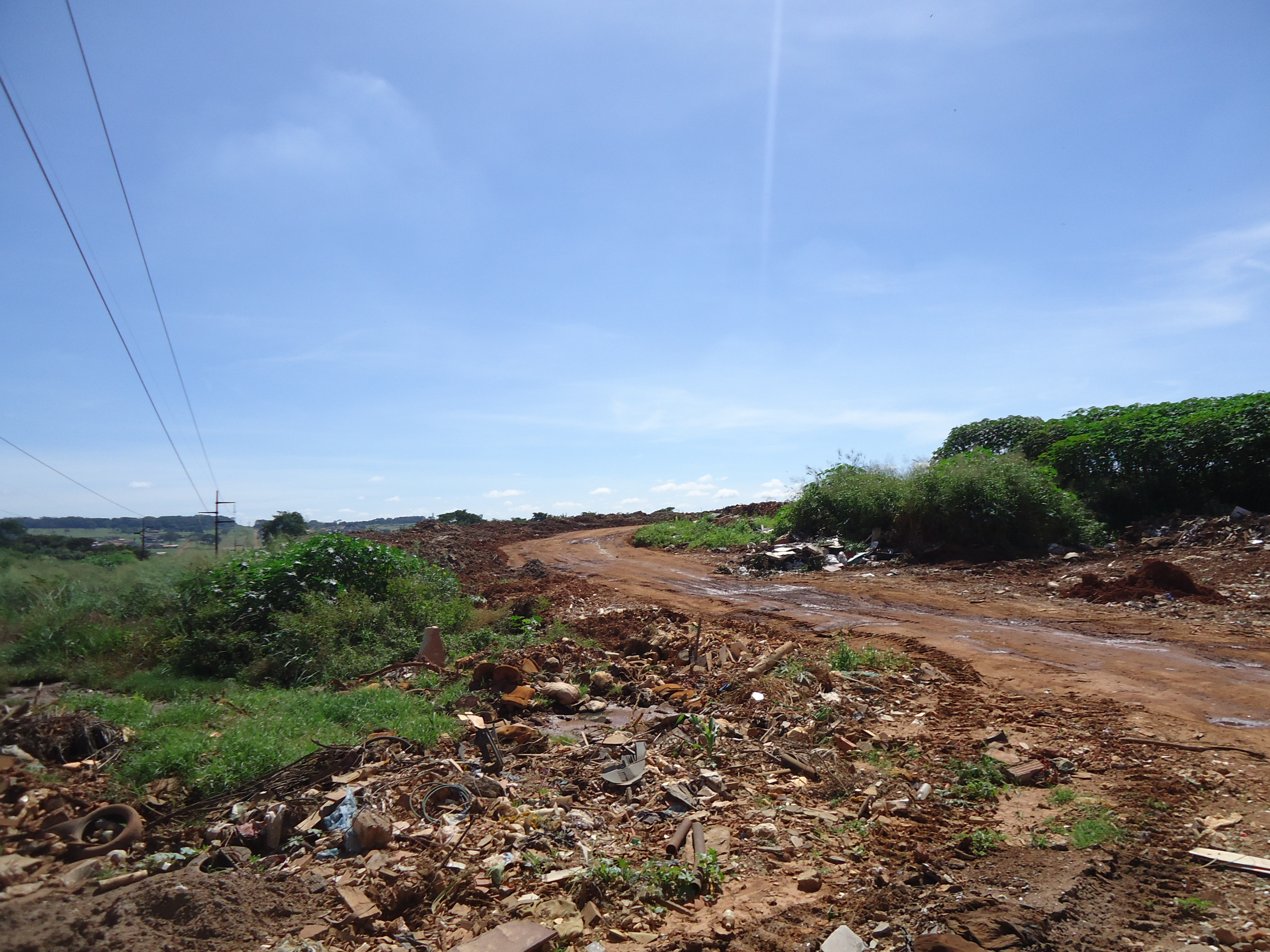 Lixo no Aterro Sanitário de Goiânia.